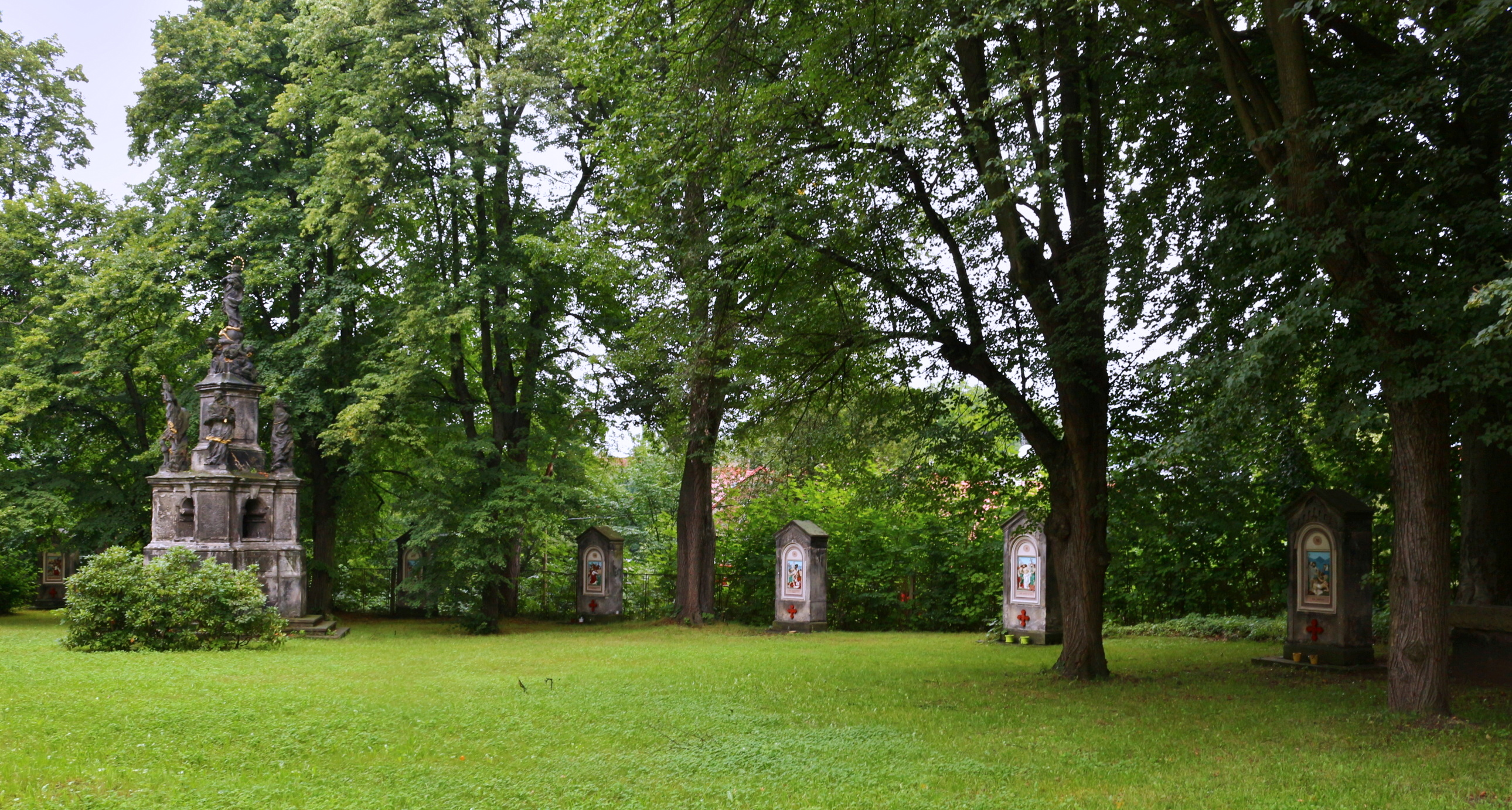 Liberecký kostel Nalezení sv. Kříže